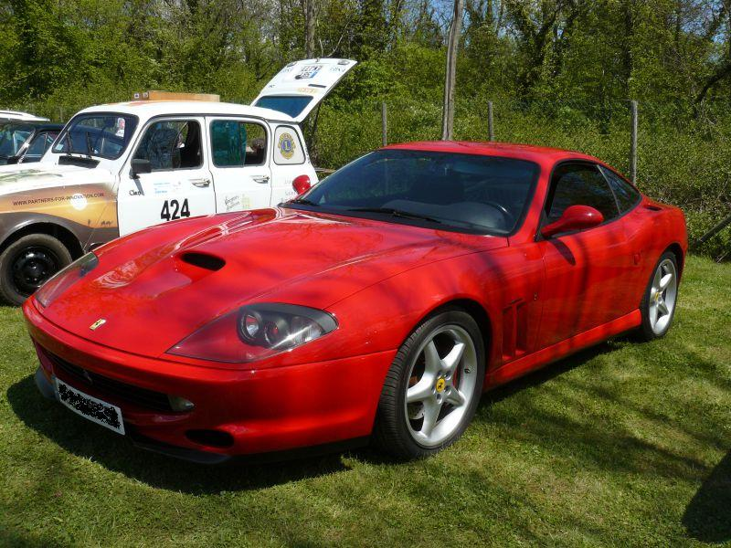 Photo prise à Chelles le 1er Mai 2012